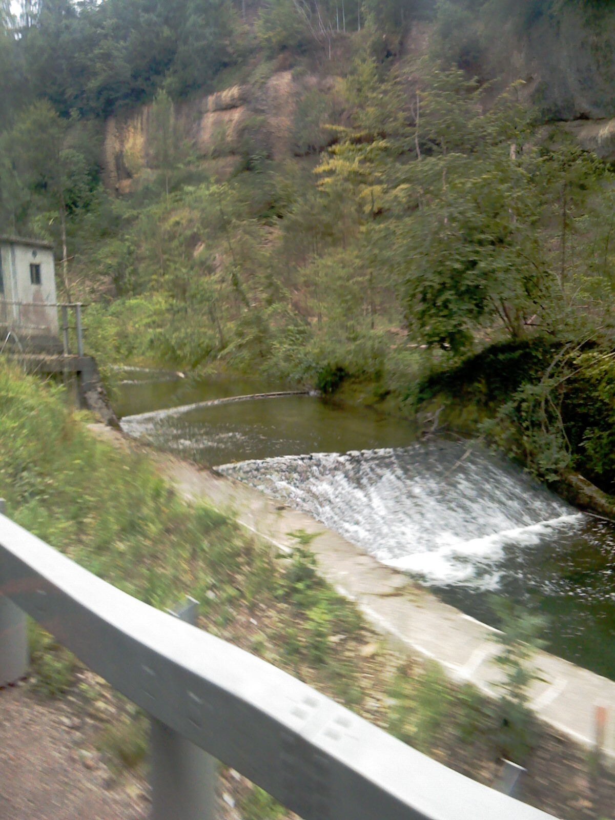 River Jona between Rüti and Wald/Rivero Jona inter Rüti kaj Wald/Jona zwischen Rüti und Wald